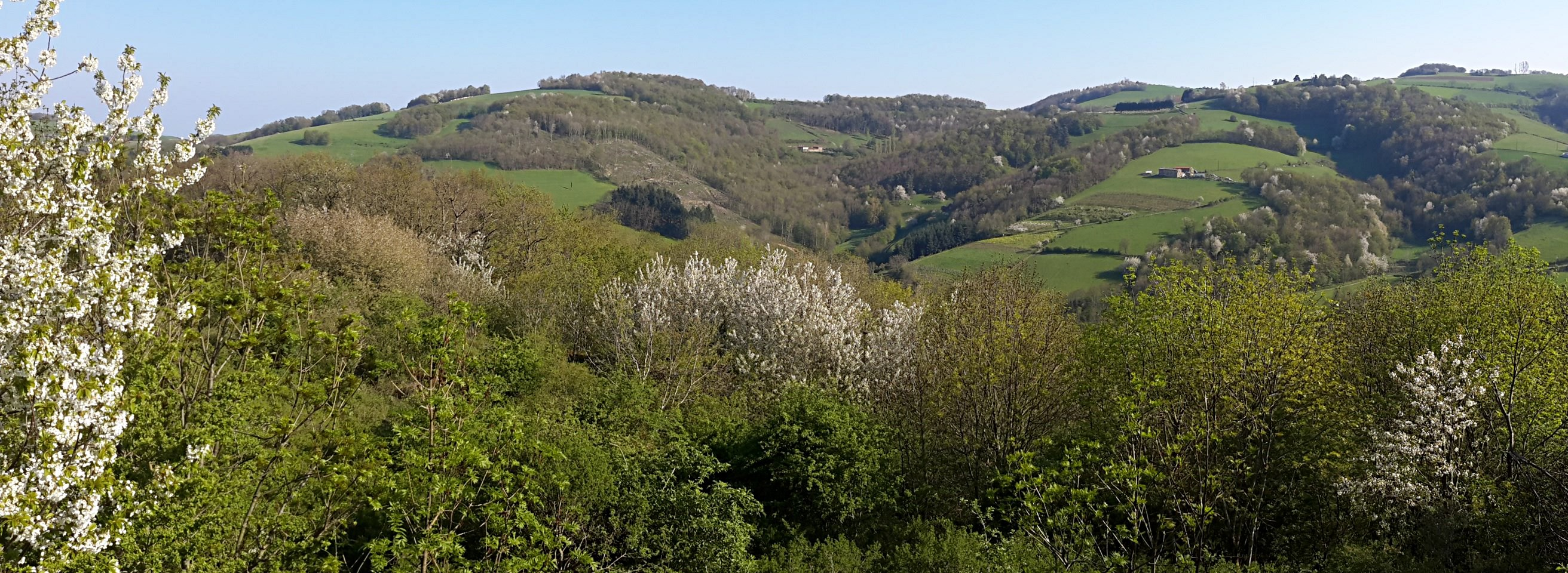 Vue vers Les Ravières depuis les Hautes Bruyères.